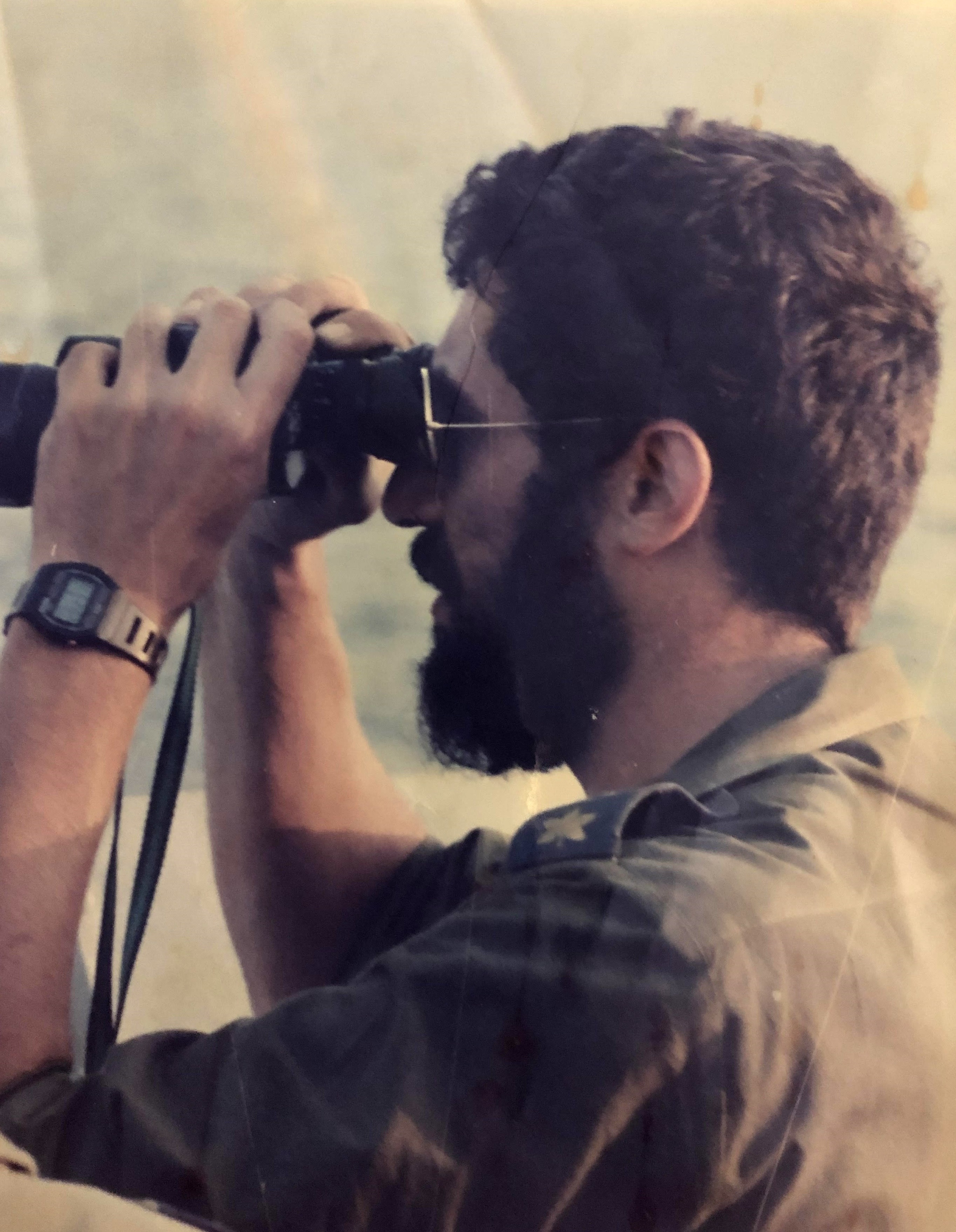 סא"ל אלי רונן מפקד פלגה 33 , 1988